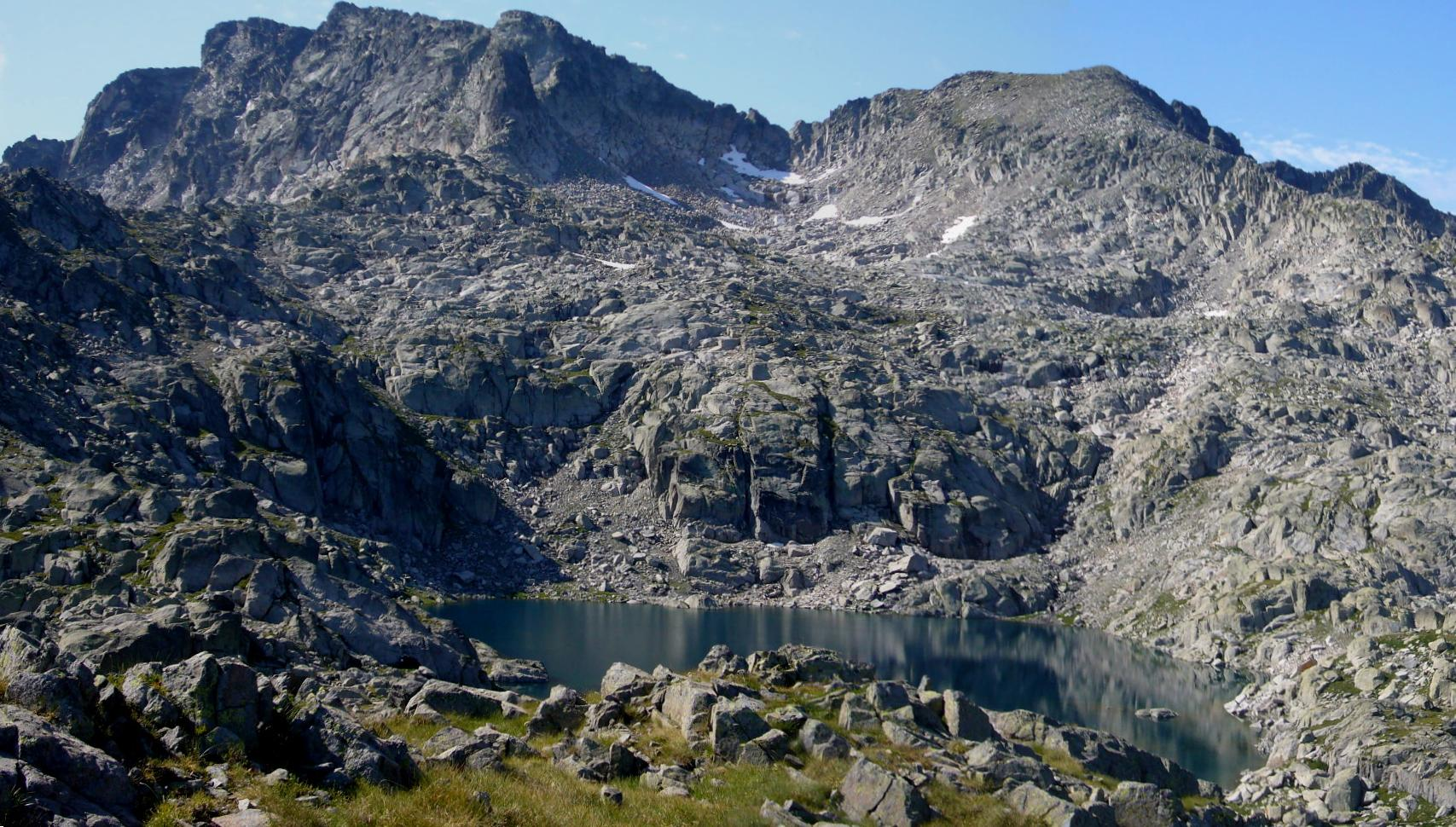 Estanh Gelat, Gran Tuc de Colomèrs, Agulha deth Gran Tuc i Tuc Blanc, vistos des del Tossal dels Óssos; Naut Aran, Vall d’Aran, Catalunya